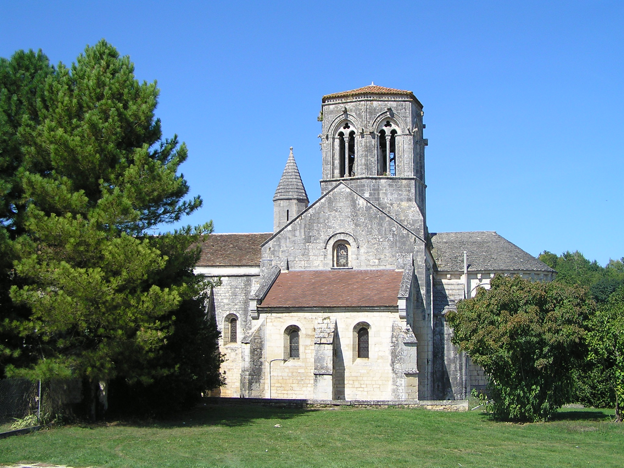 église de Mouthiers-sur-Boëme